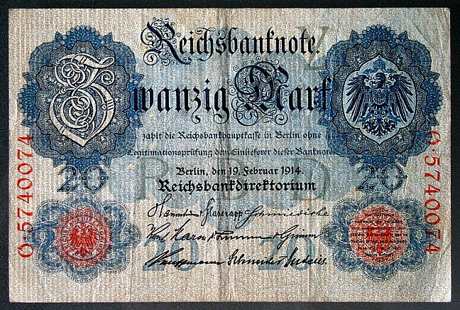 Banknote - 20 Mark - Deutsches Reich - 19.02.1914